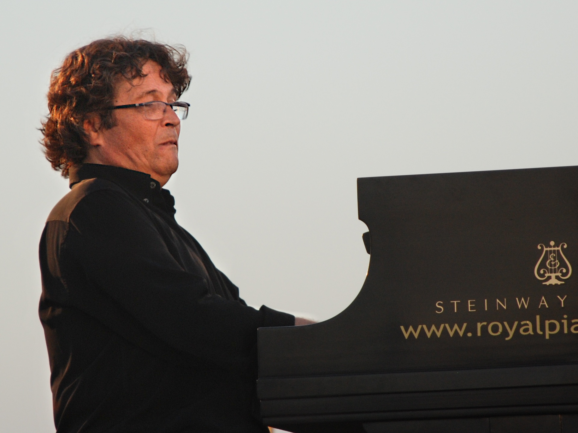 Chano Domínguez, Chano estuvo genial en todo el concierto y también hizo un tema el solo.